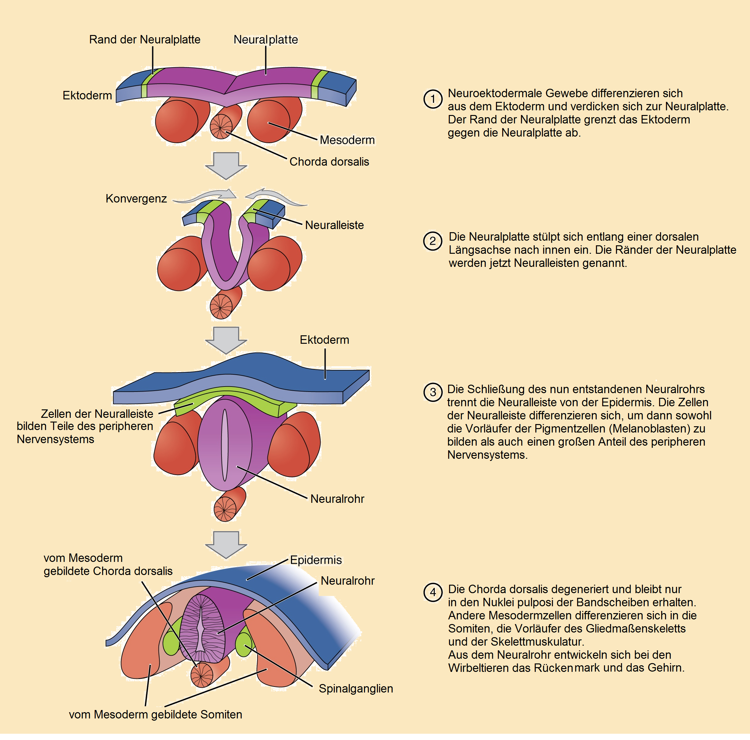 Neurulation